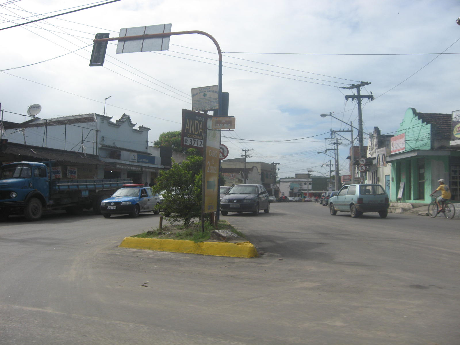 Vista da cidade de Itaboraí, no estado do Rio de Janeiro, Brasil.